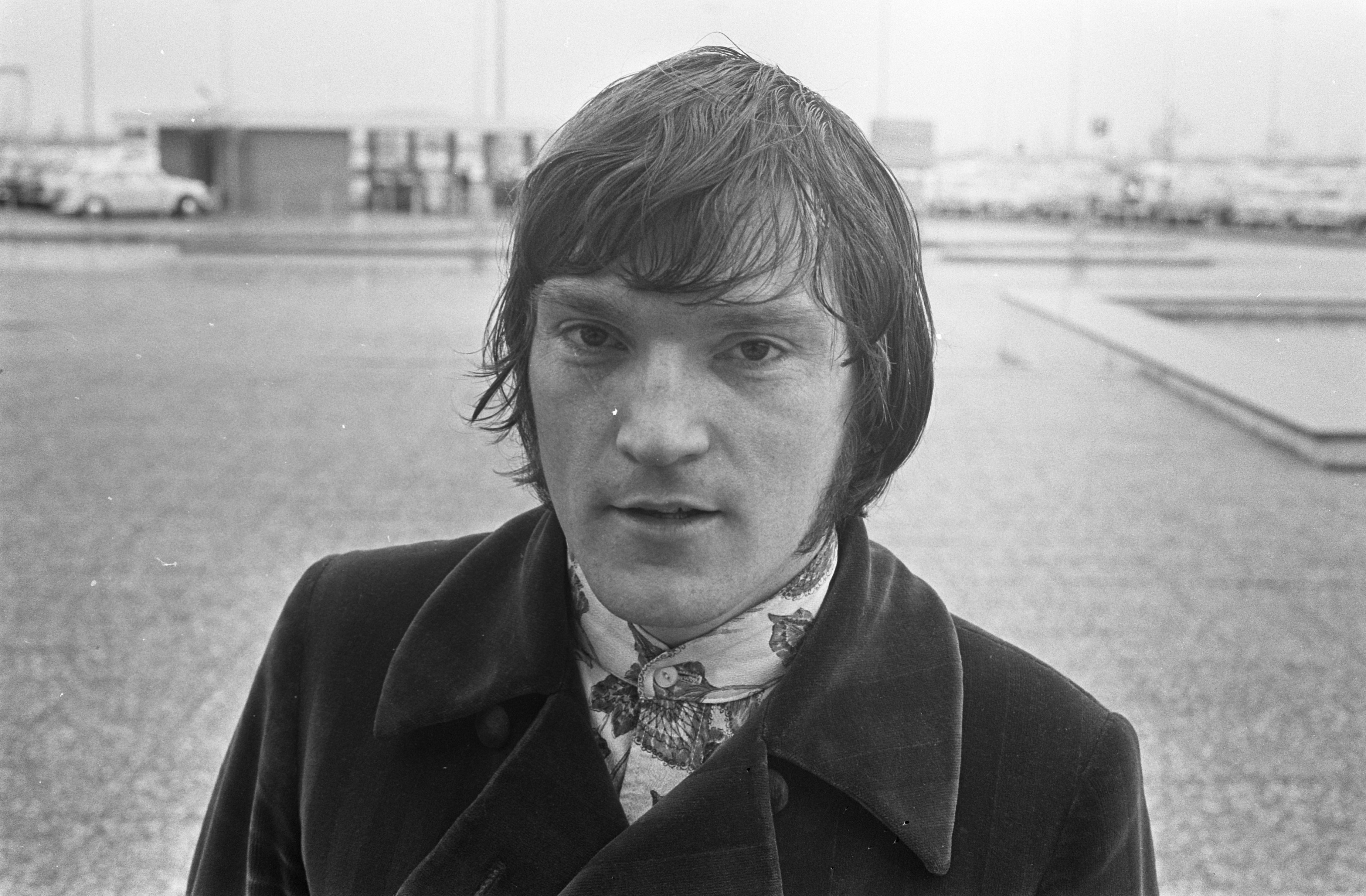 Collectie / Archief : Fotocollectie Anefo Reportage / Serie : [ onbekend ] Beschrijving : Aankomst Engelse popzangeres Julie Driscoll op Schiphol Datum : 29 april 1968 Locatie : Noord-Holland, Schiphol Trefwoorden : aankomsten, zangeressen Persoonsnaam : Julie Driscoll Fotograaf : Koch, Eric / Anefo Auteursrechthebbende : Nationaal Archief Materiaalsoort : Negatief (zwart/wit) Nummer archiefinventaris : bekijk toegang 2.24.01.05 Bestanddeelnummer : 921-2977